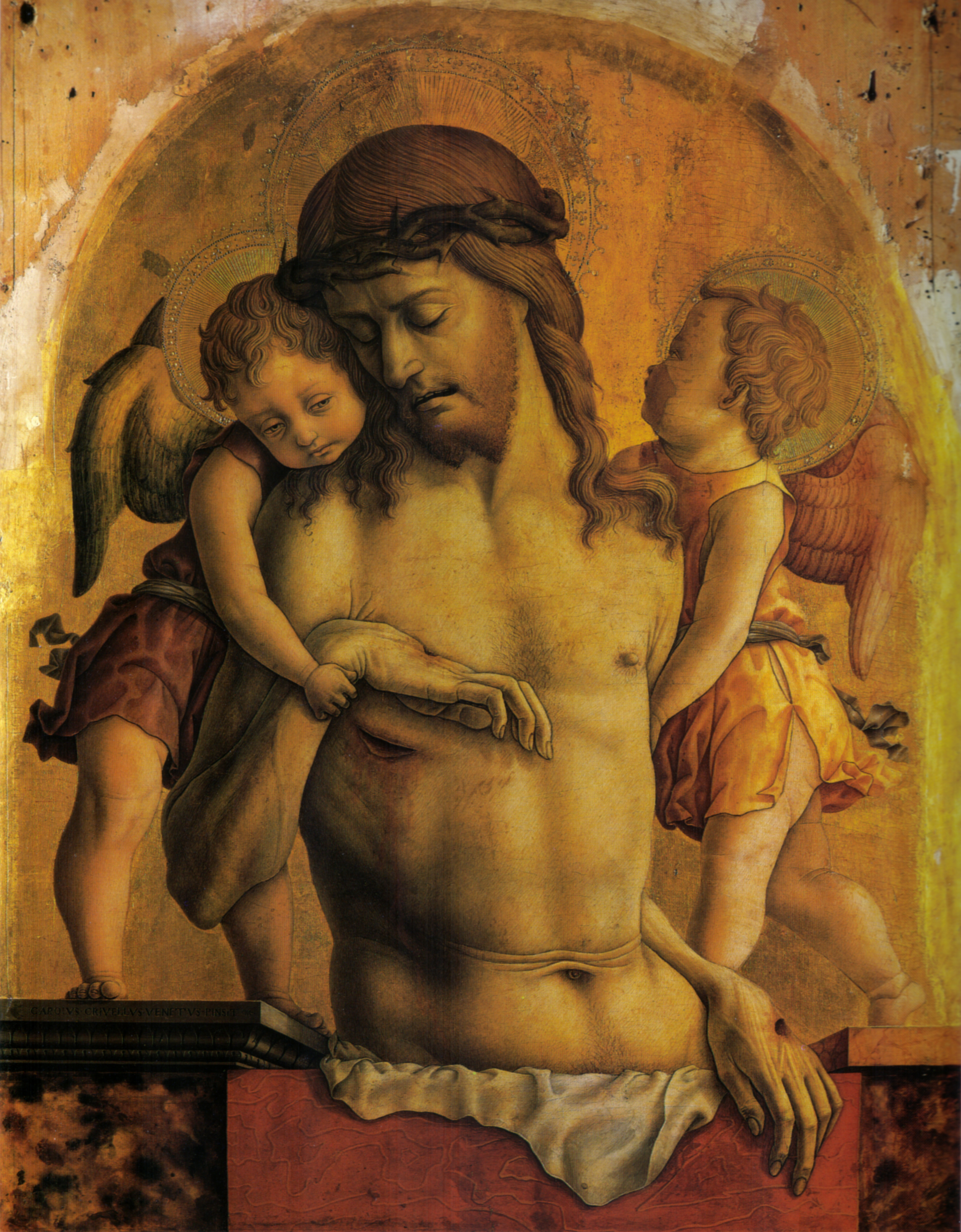 Carlo crivelli, montefiore, pietà di londra